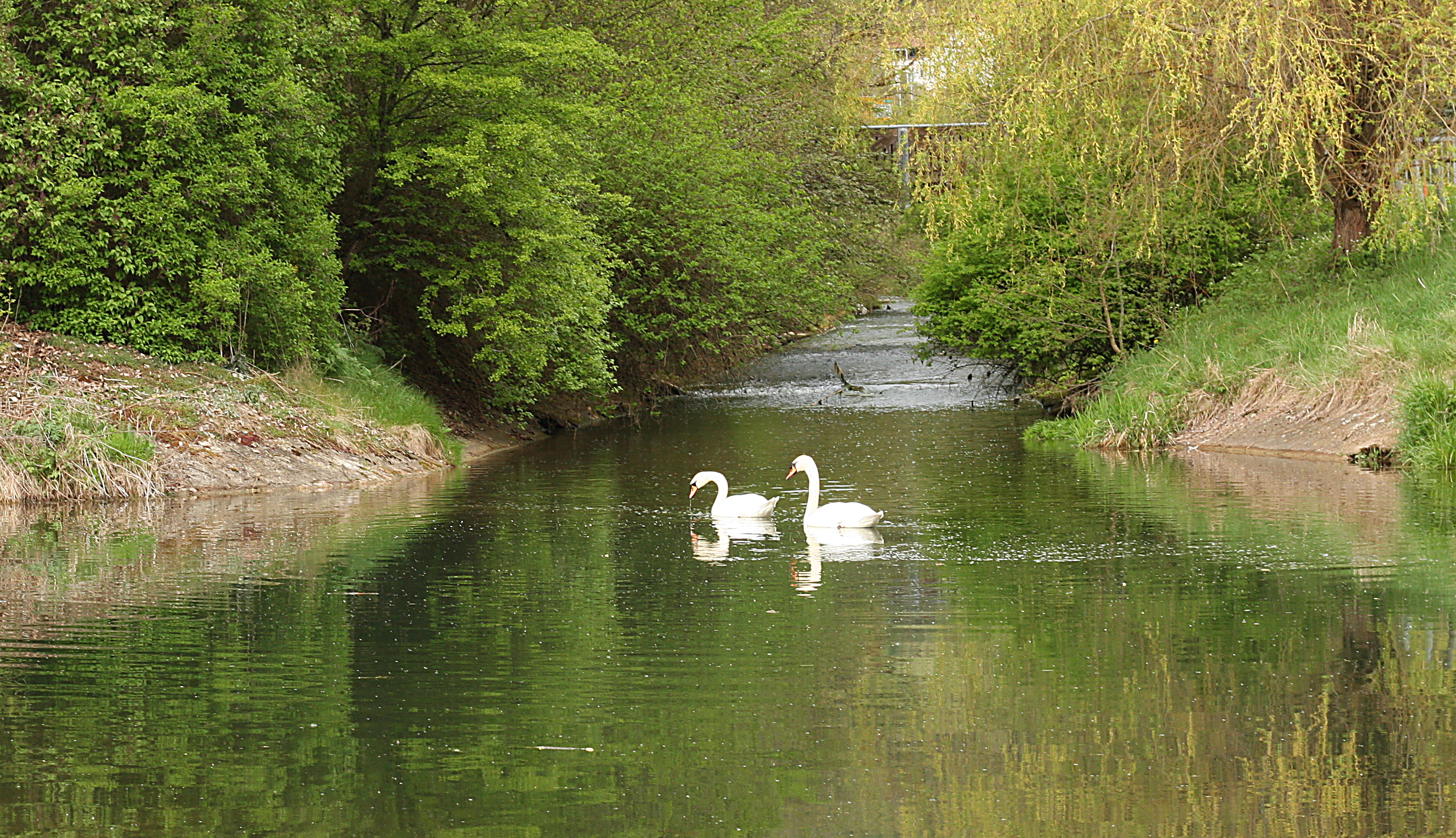 Die Mündung der Elta in die Donau in Tuttlingen